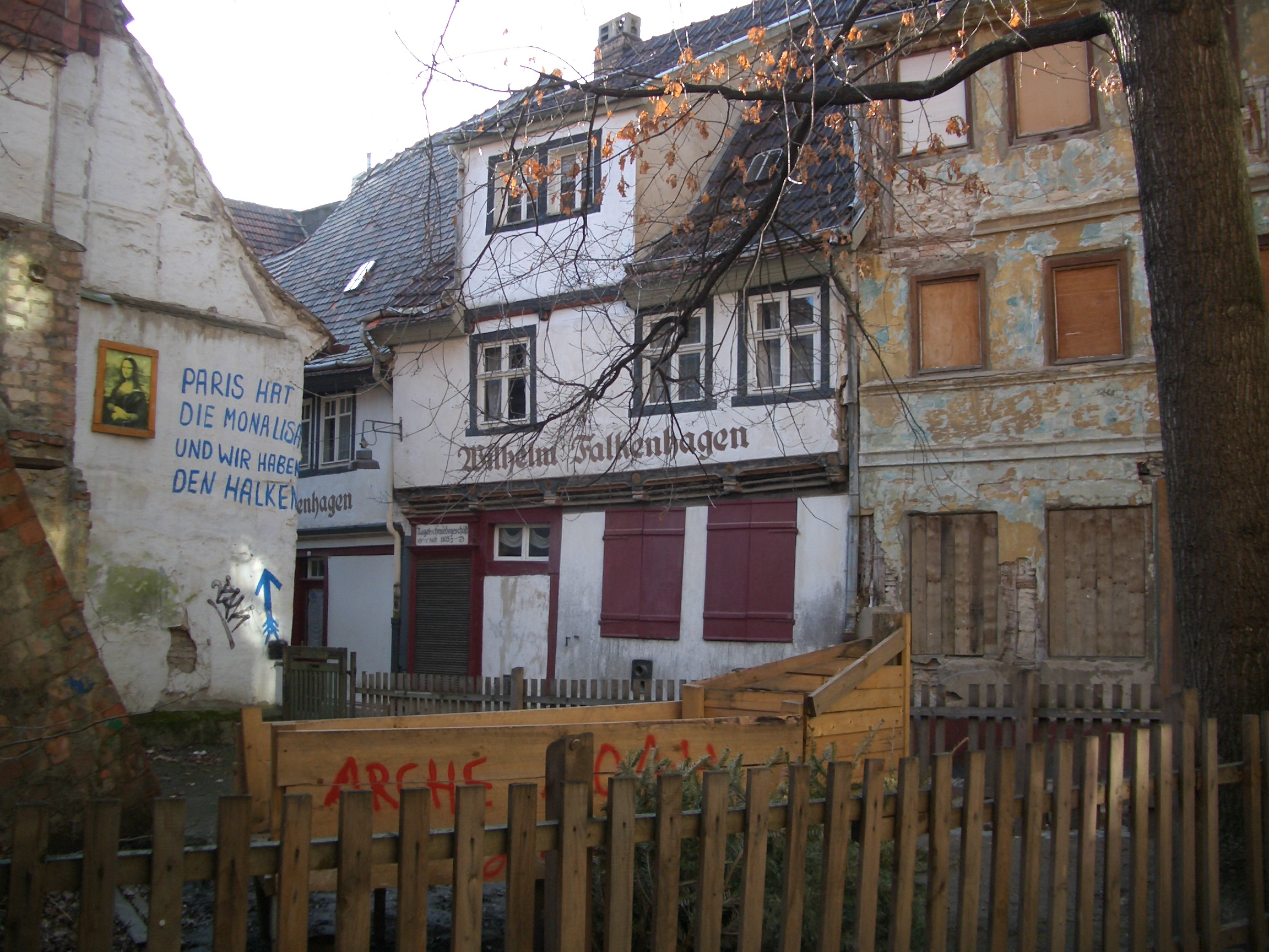 Alte Häuser in Aschersleben